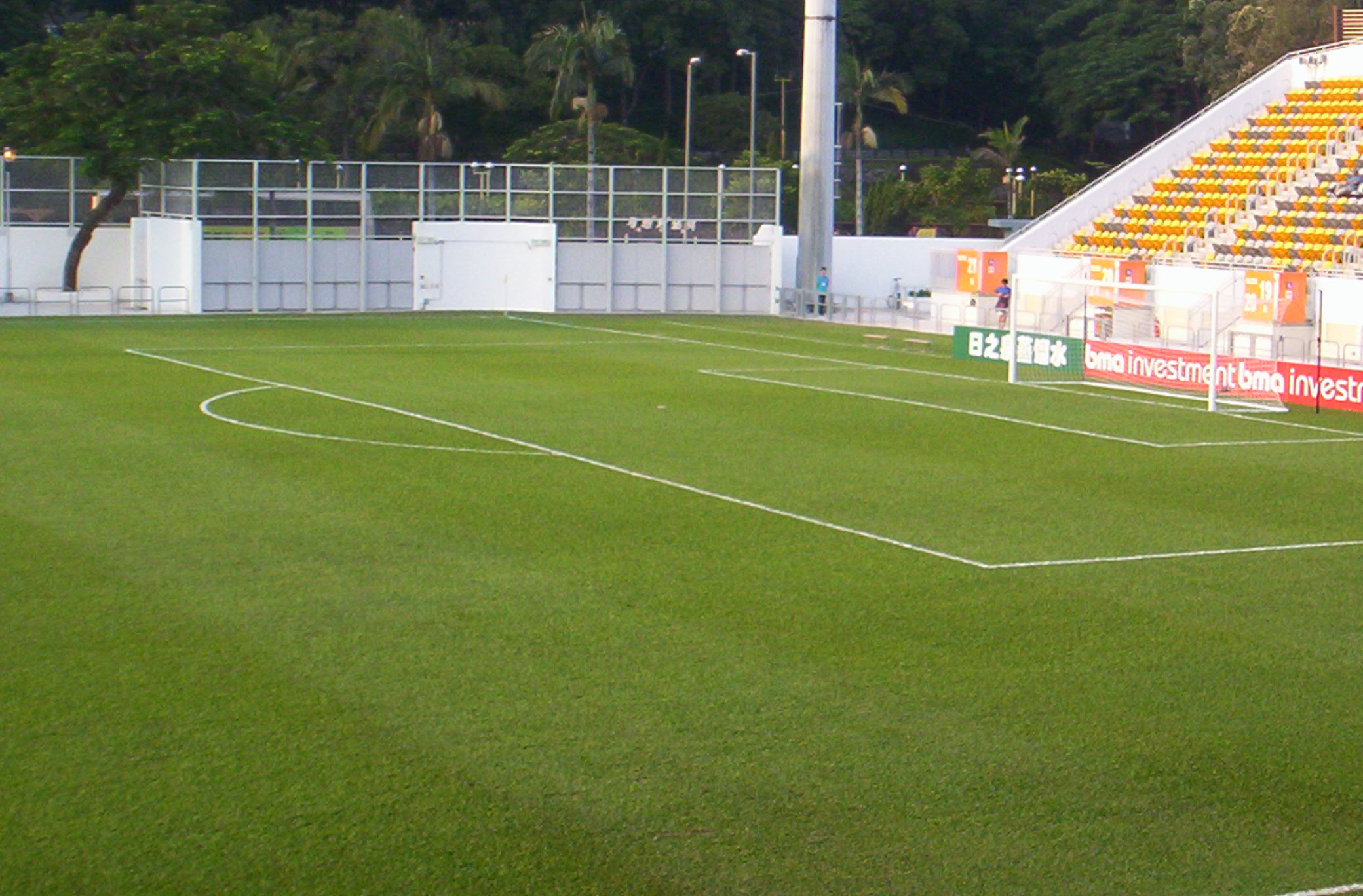 中文（香港）: 足球場龍門、鵝眉月、禁區